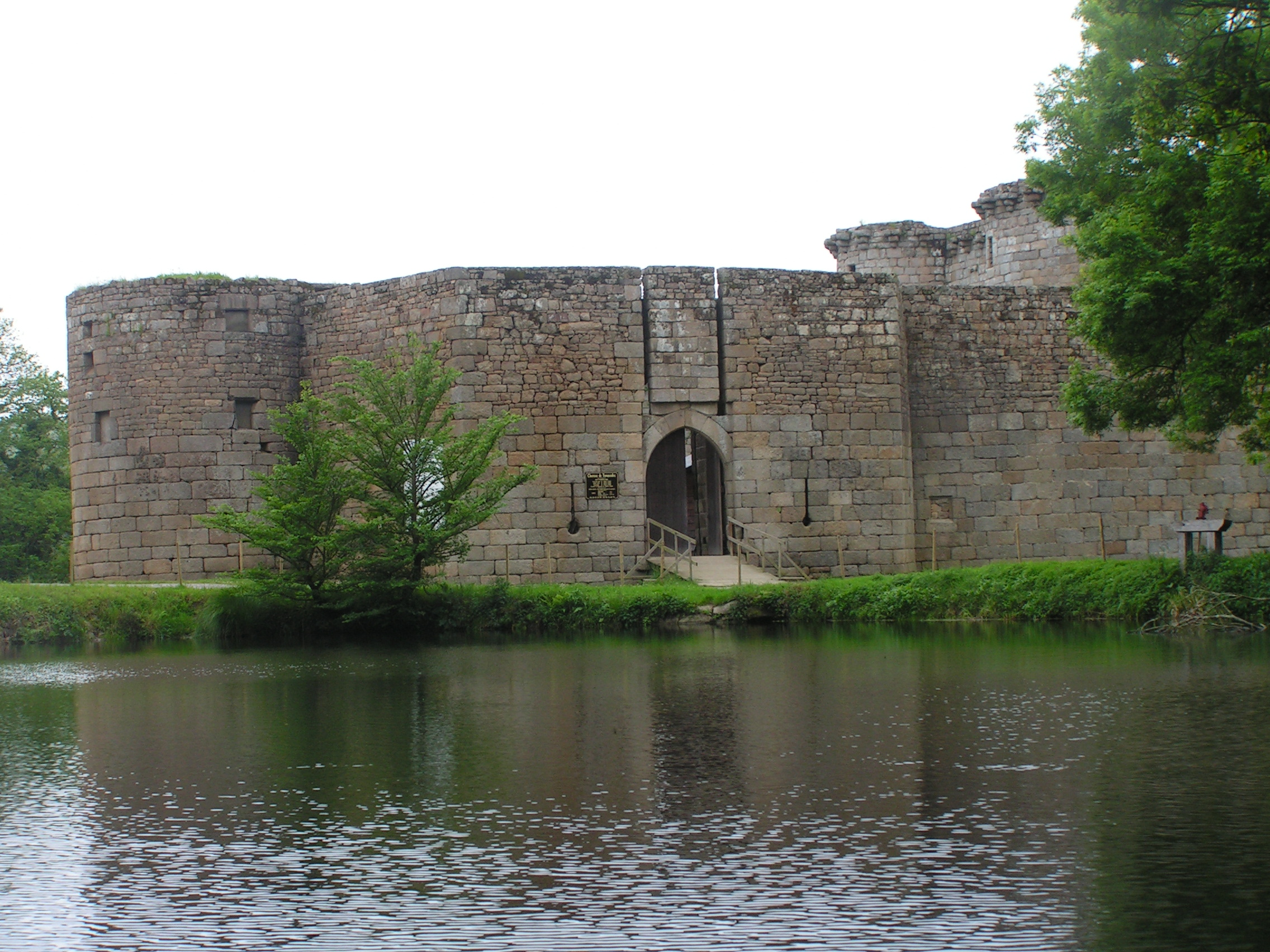 Château de Tonquédec (Côtes d'Armor - France)